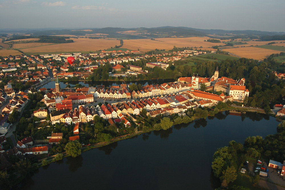 Telč z ptačí perspektivy